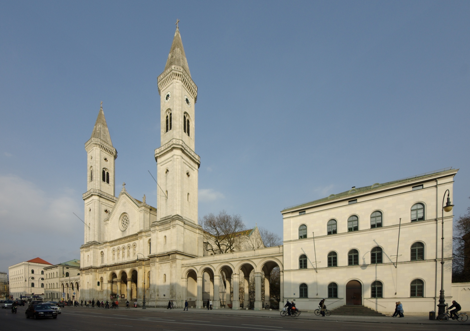 München, Kath. Pfarr- und Universitätskirche St. Ludwig (Ludwigstraße 20), Friedrich von Gärtner, 1829-1844